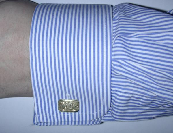 Umschlagmanschette mit Manschettenknopf